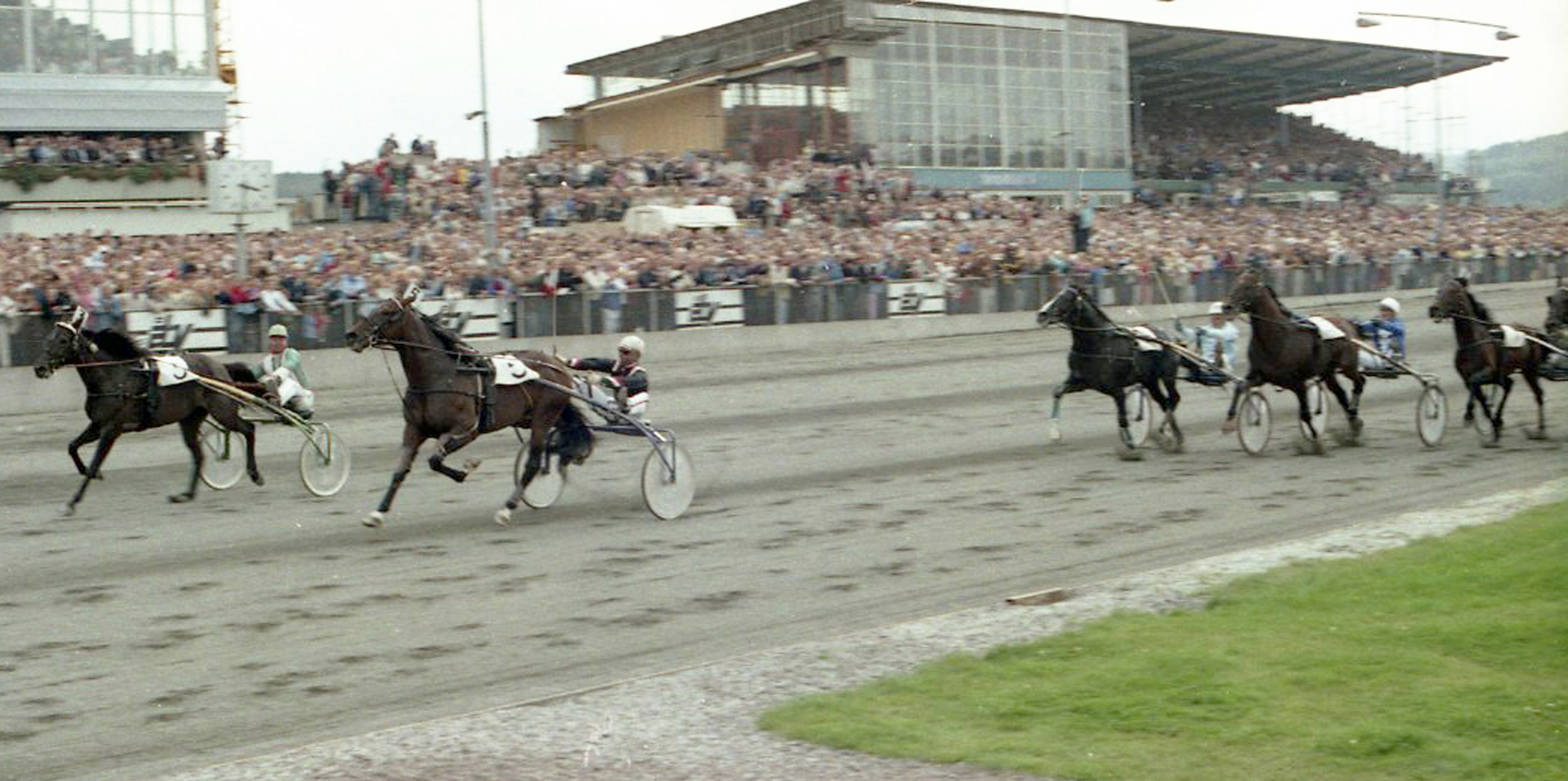 Travaren Legolas och kusken Thomas Nilsson (ekipage nr. 3) vinner Åbys Stora Pris på Åbytravet 1983.